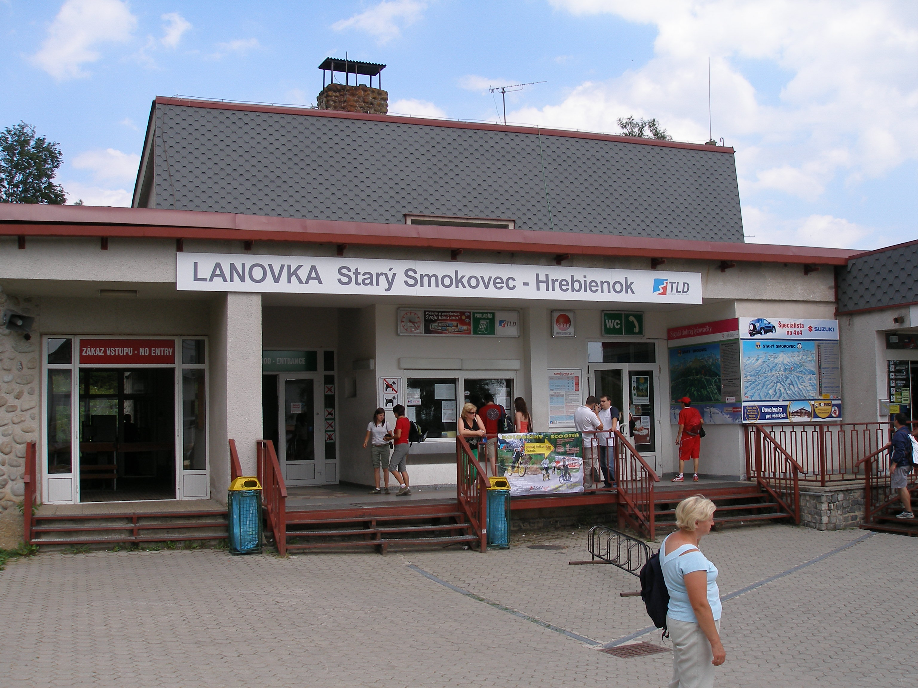 Tatranská osada Starý Smokovec, Slovakia